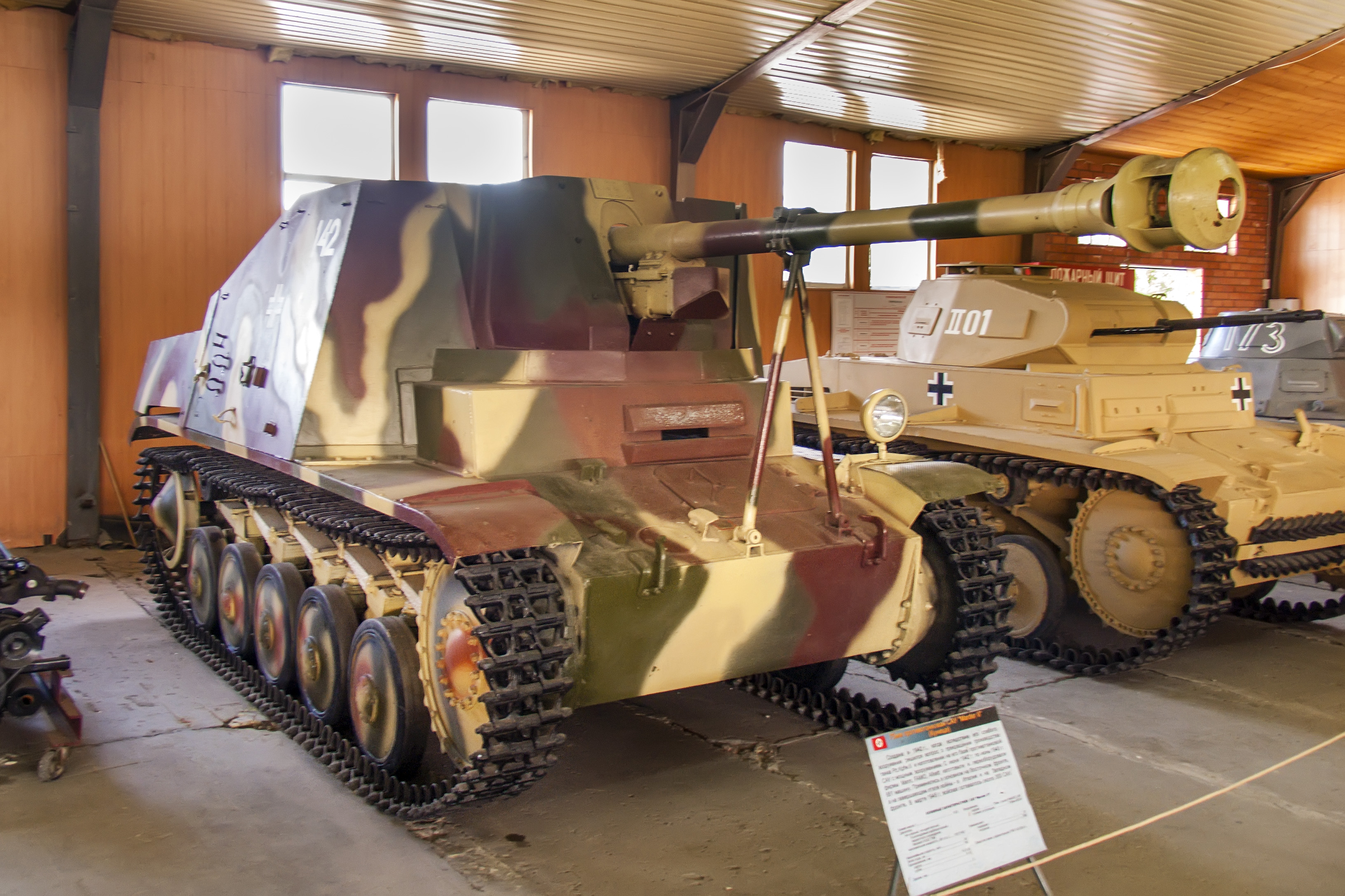 Легкая противотанковая самоходная установка "Мардер II" (7.5 cm PaK.40/2 auf Fahrgestell Pz.Kpfw.II Ausf.A-F (Sf) Marder II, SdKfz131) в Центральном музее бронетанкового вооружения и техники в Кубинке.